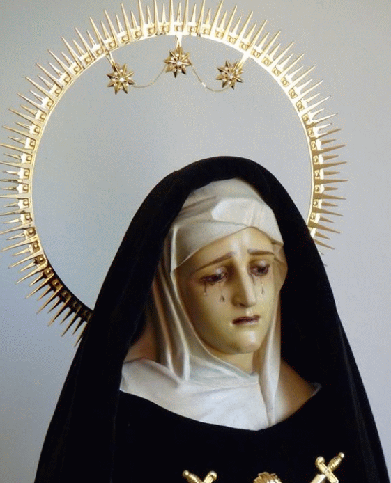 Imagen de Nuestra Señora de los Dolores de Chandavila, La Codosera, España.